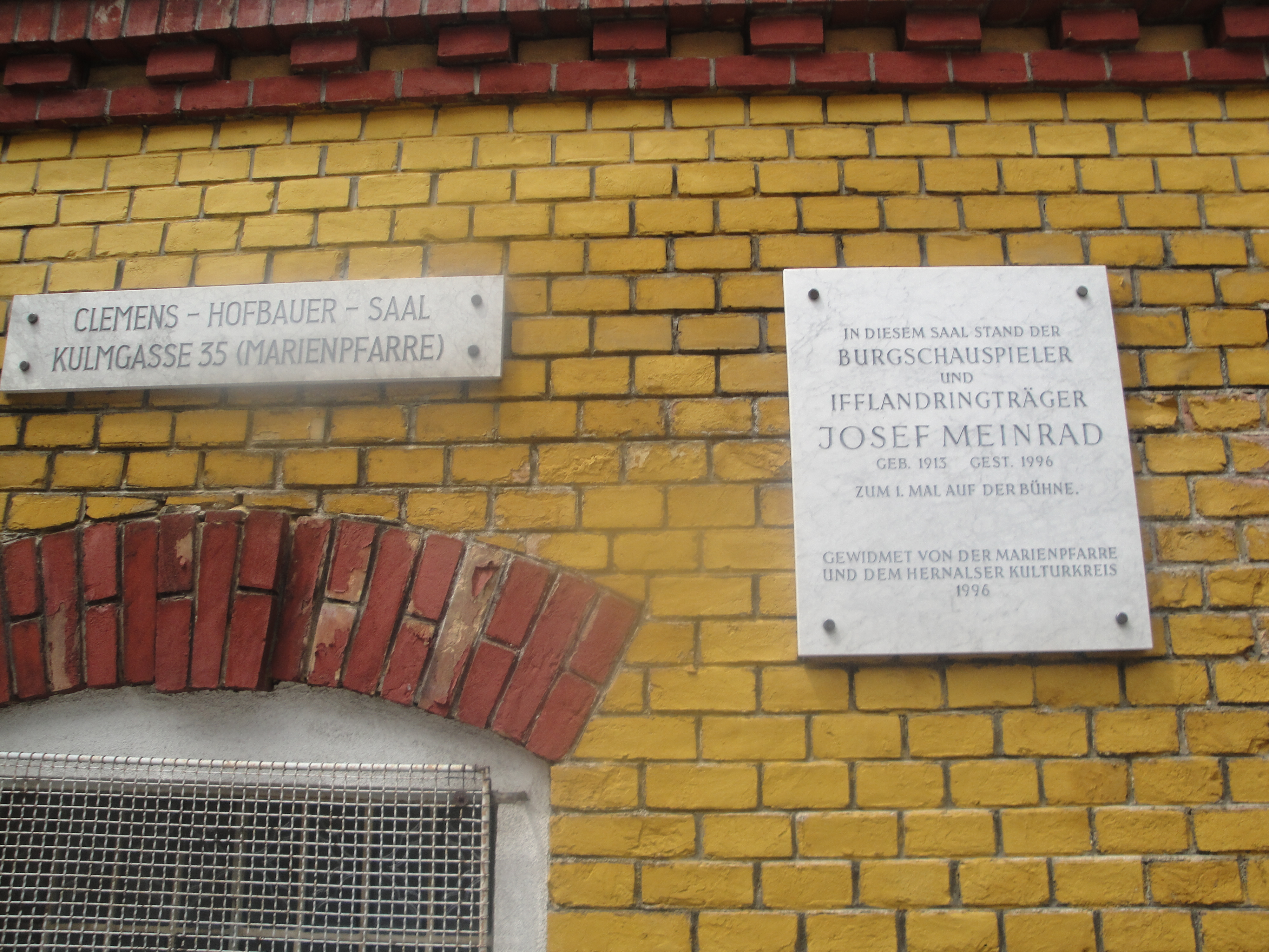 Gedenktafel zum Bühnendebut von Josef Meinrad